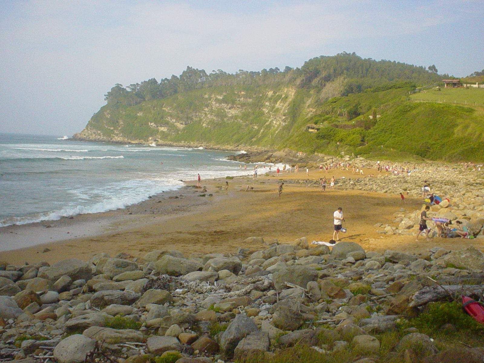 Playa de España en Asturias.